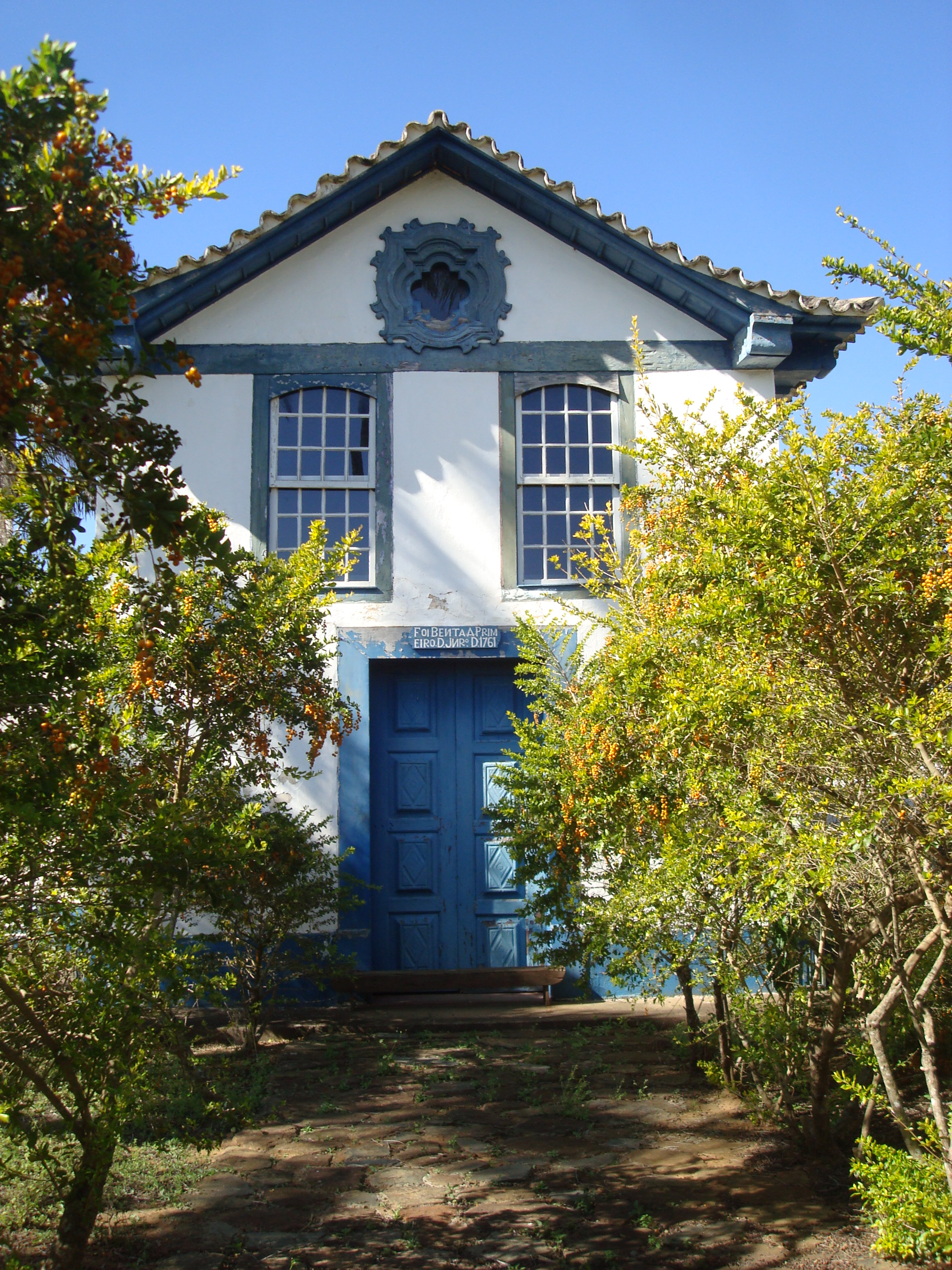 Capela benta em Primeiro de Janeiro de 1761, aí foram batizados e enterrados gerações e gerações de Junqueiras.